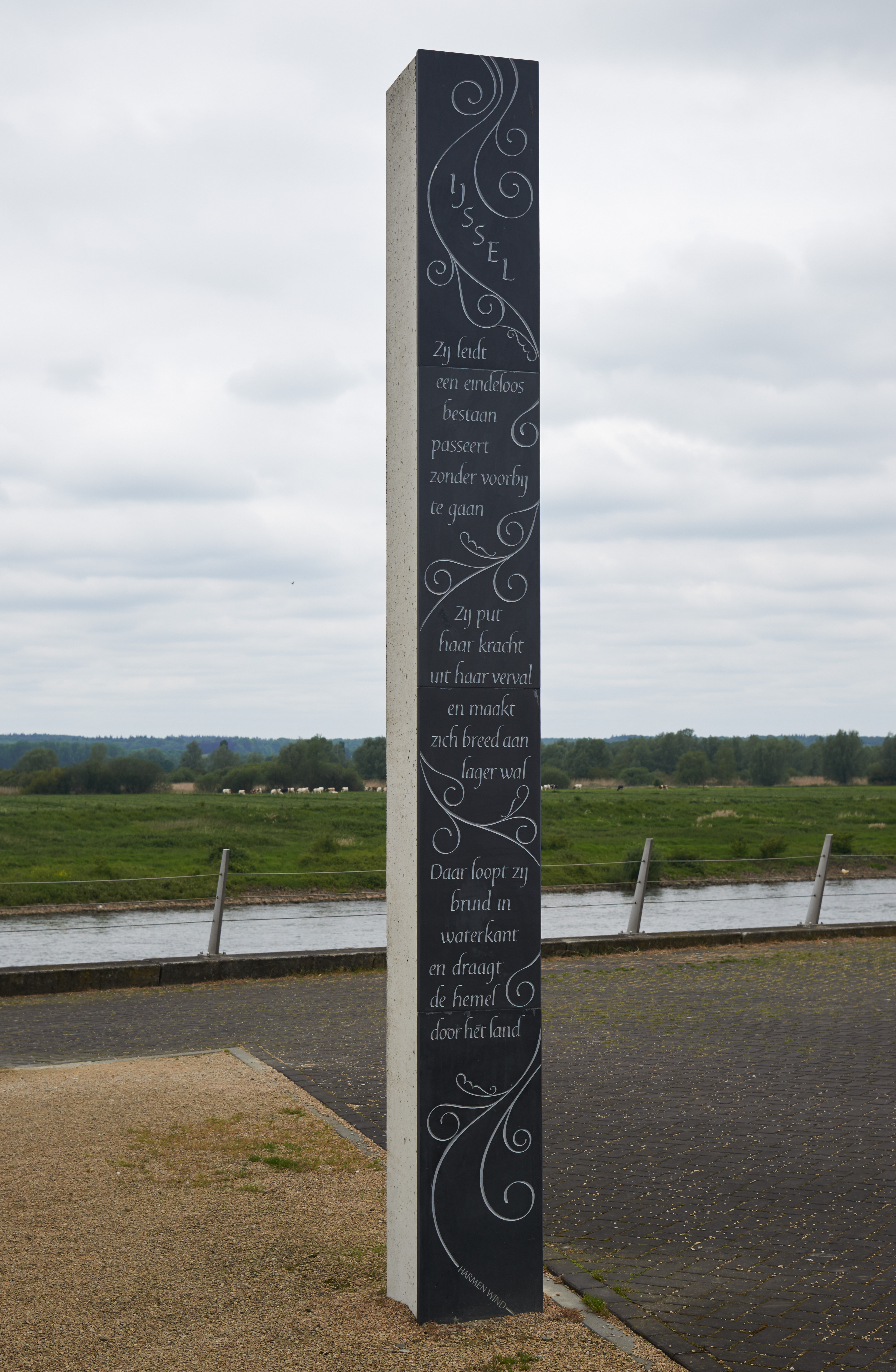 Beeld van Julie Rézac en gedicht van Harmen Wind aan de IJsselkade in Doesburg, Nederland. De tekst is: "Zij leidt een eindeloos bestaan Passeert zonder voorbij te gaan Zij put de kracht uit haar verval en maakt zich breed aan lager wal Daar loopt zij bruid in waterkant en draagt de hemel door het land"